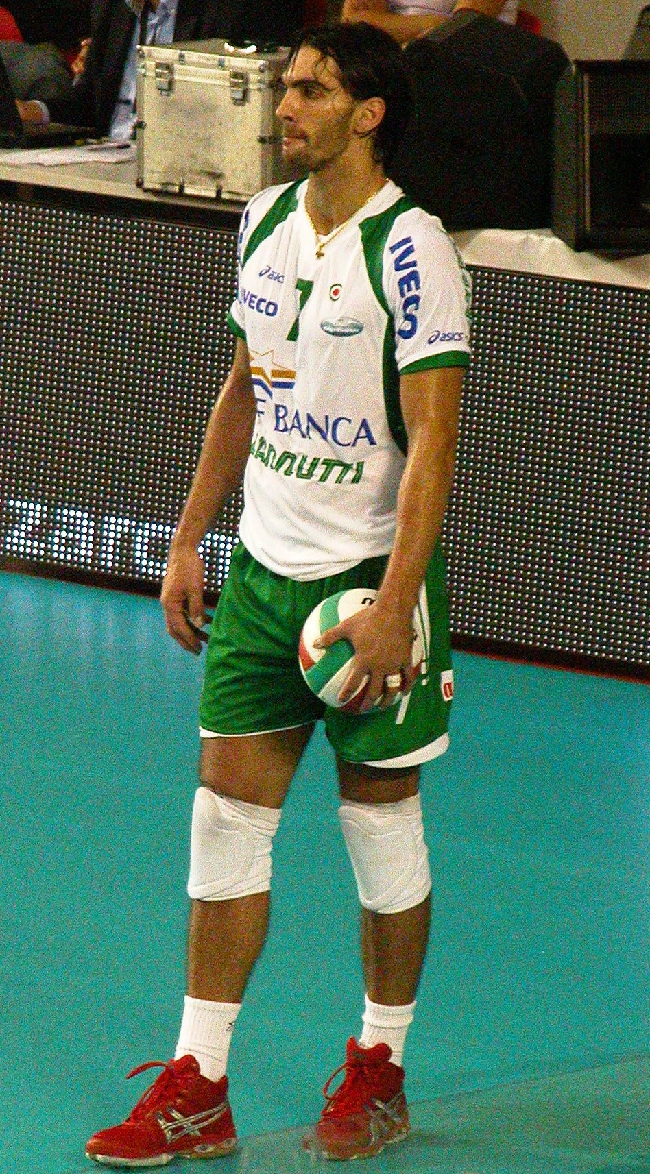 Brazilian volleyball player Giba